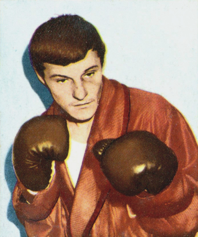 MUNCHEN 72 - Figurina-Stickers - Panini - N° 20 - TOMCZYK -POL- PUGILATO - Rec